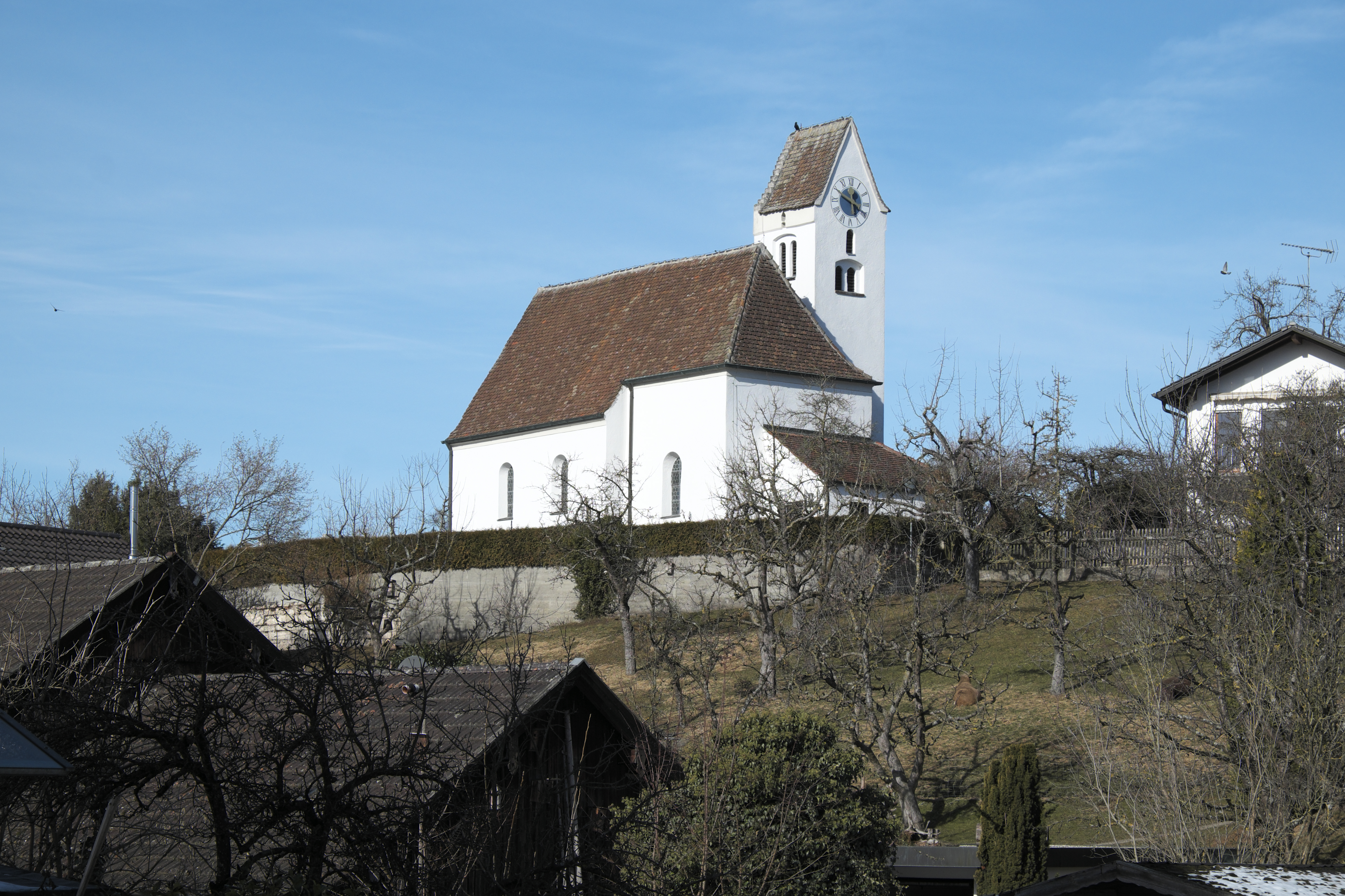 Alte katholische Pfarrkirche St. Johannes der Täufer in Breitbrunn am Ammersee (Herrsching am Ammersee) im Landkreis Starnberg (Bayern/Deutschland)